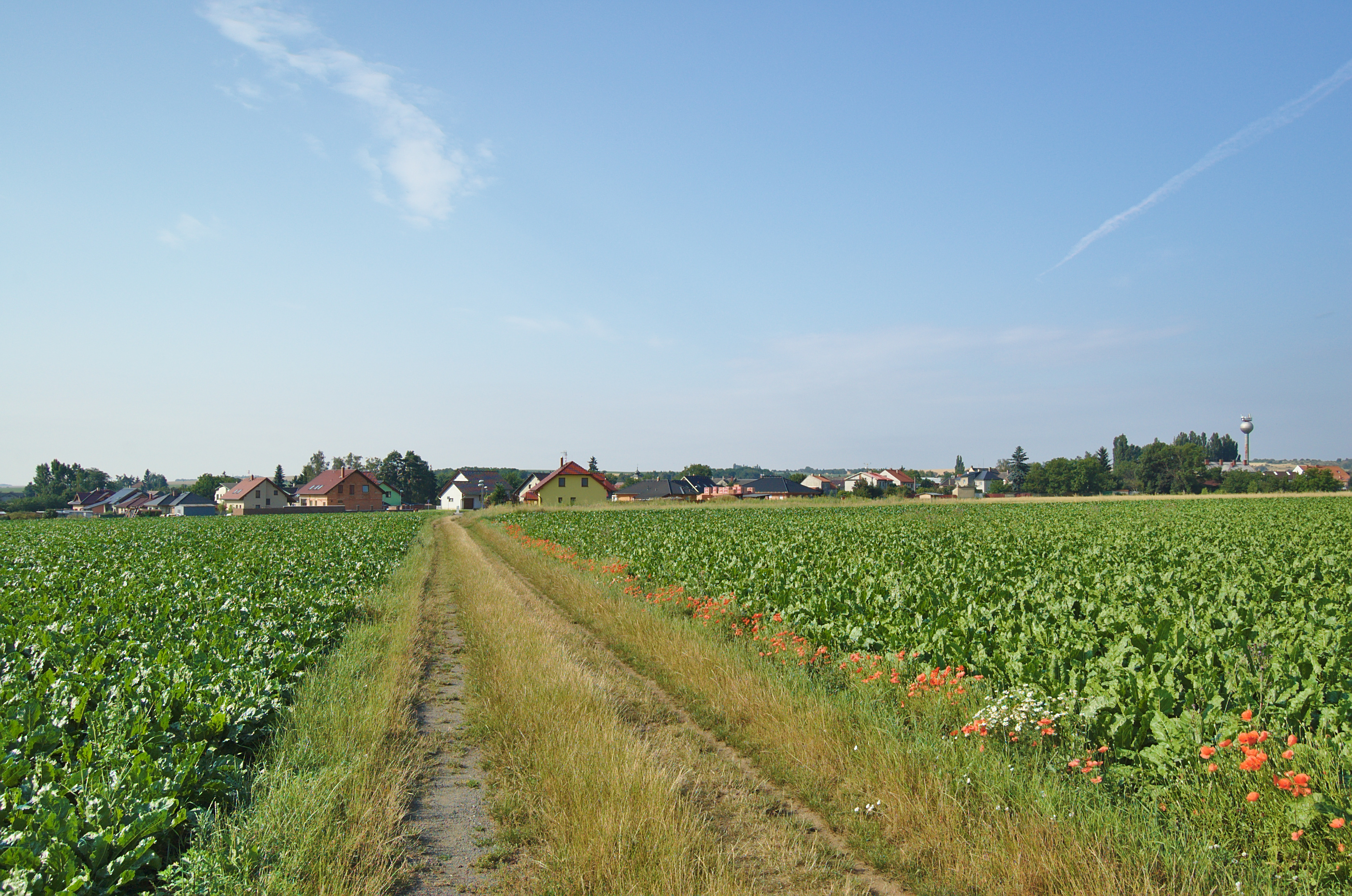 Pohled na Třebčín ze severu, Lutín, okres Olomouc